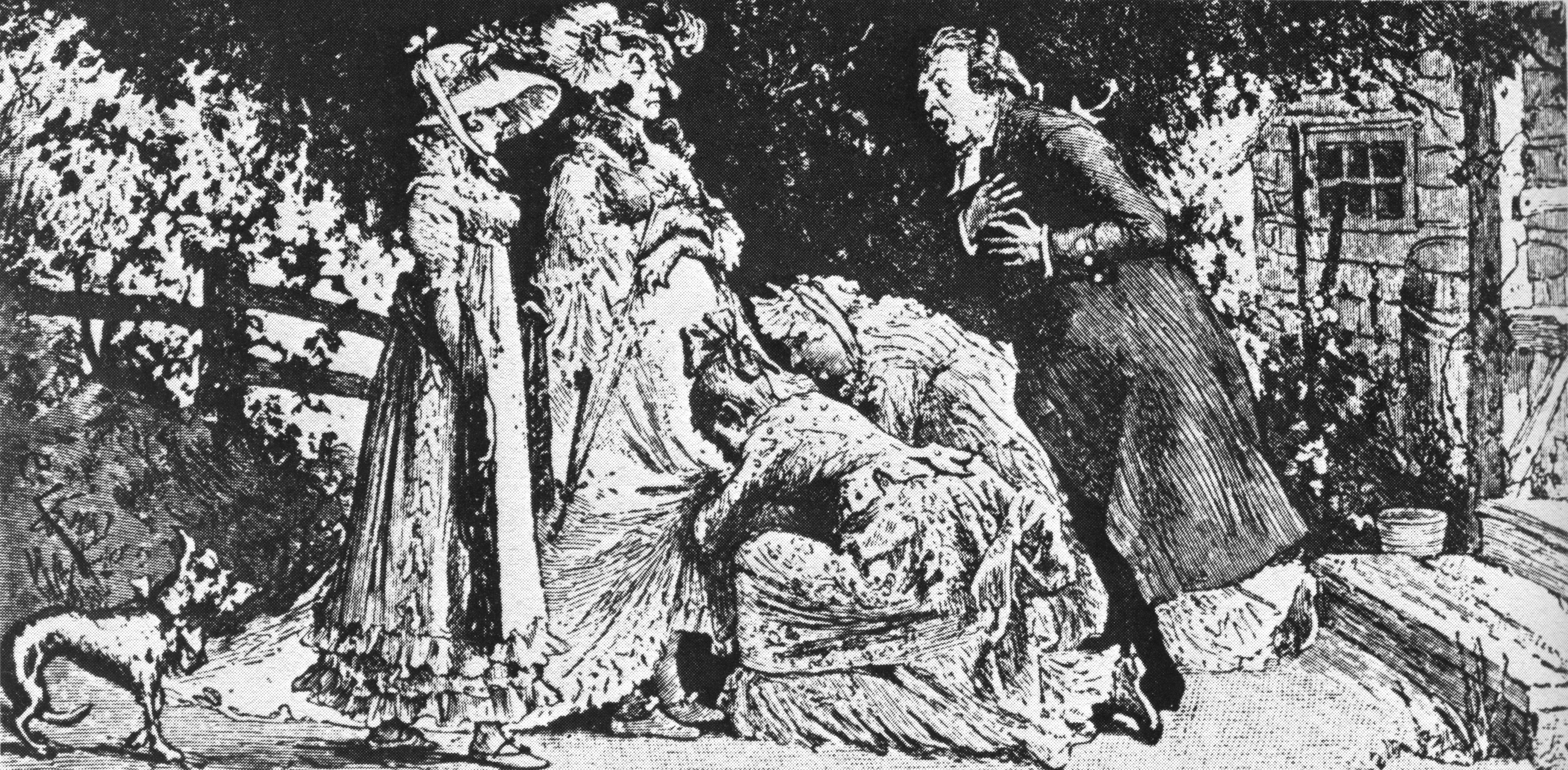 Illustration av Carl Larsson till Lenngrens dikt Grevinnans besök, en satir över en prästfamiljs fjäsk inför ett adelsherrskap: "Och dotter och mor foro ödmjukt framstupa att kyssa den grevliga kjoln."